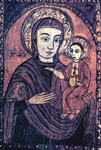 Icône grecque-catholique hongroise prise sur la version hongroise (précision droits : pas de droits 70 ans après la mort de l'auteur / For visitors from other countries: the copyright of this image has expired in Hungary 70 years after the death of the author) [1]